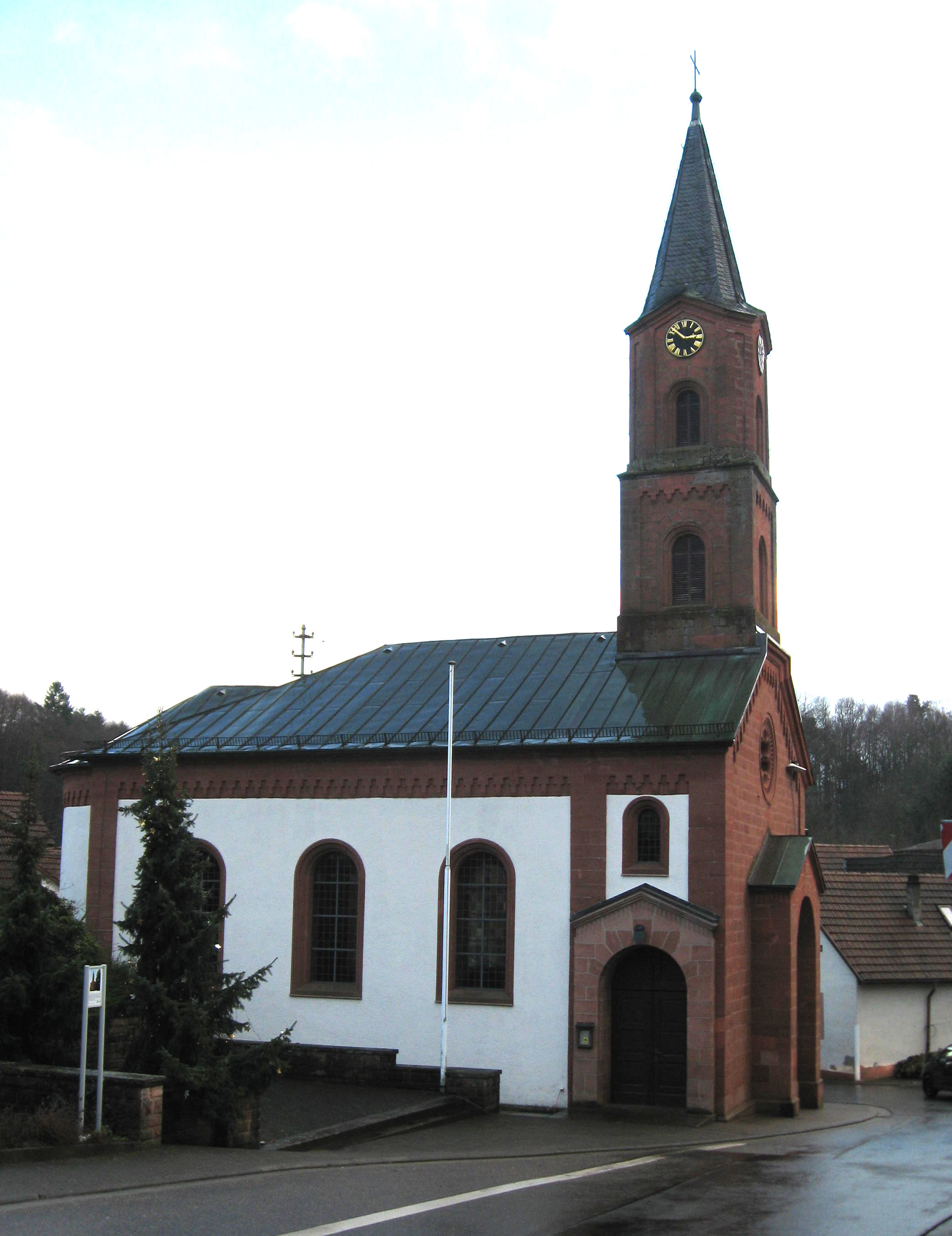 Katholische Kirche St. Martin in der Hauptstraße von Stein (Gossersweiler-Stein)